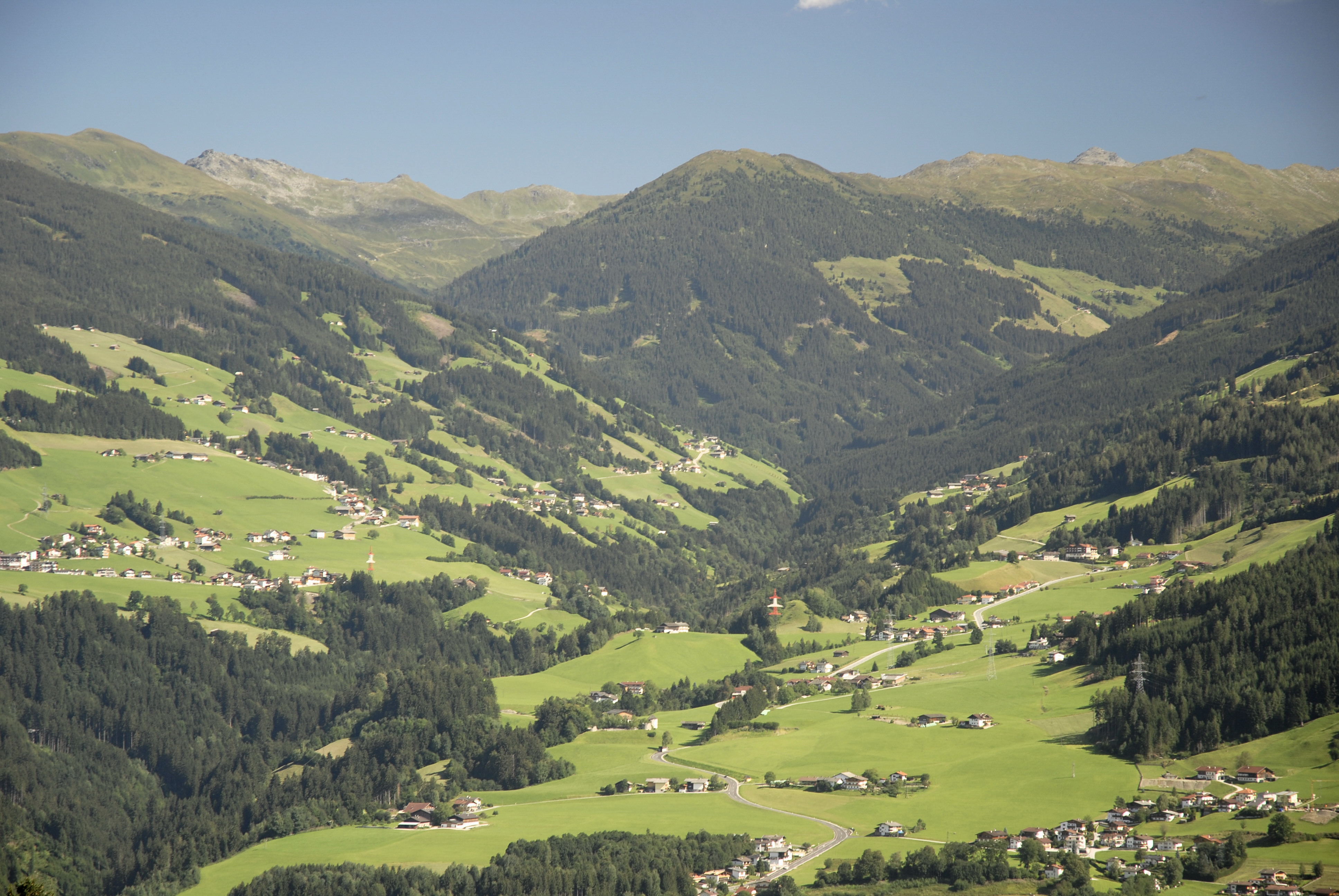 Blick von Eggen am Gnadenwalder Plateau in die Tuxer Alpen mit Innerweerberg (links) und Kolsassberg (rechts)